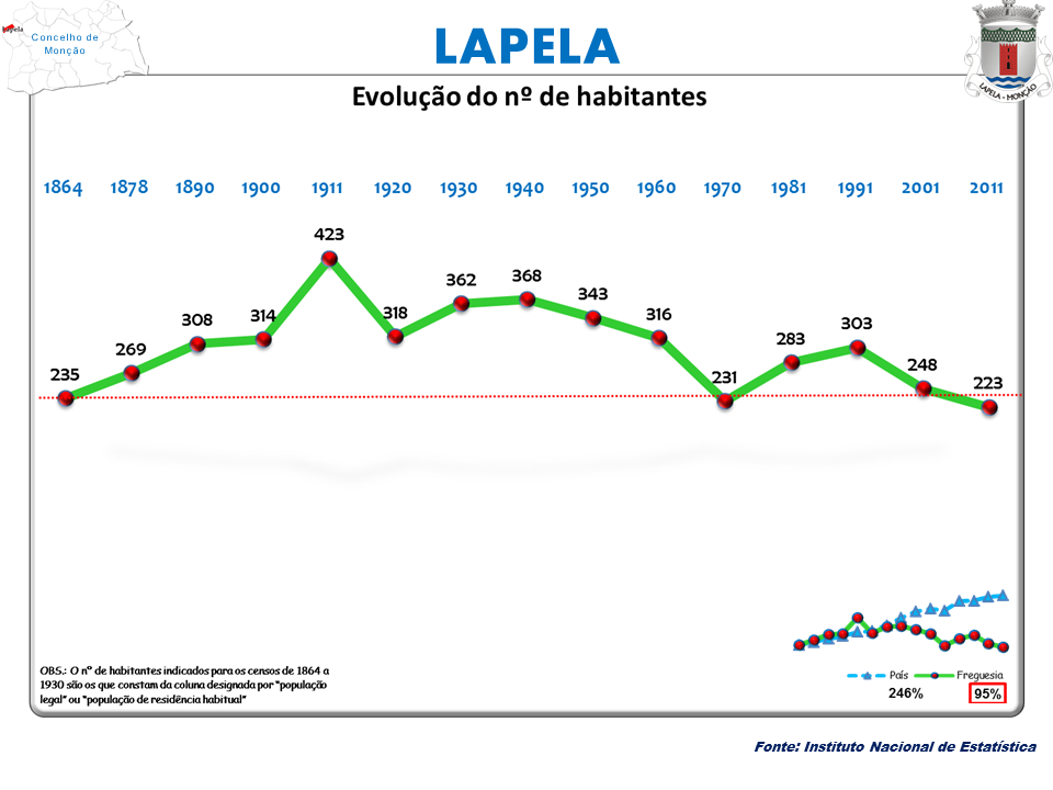 Censos 1864/2011